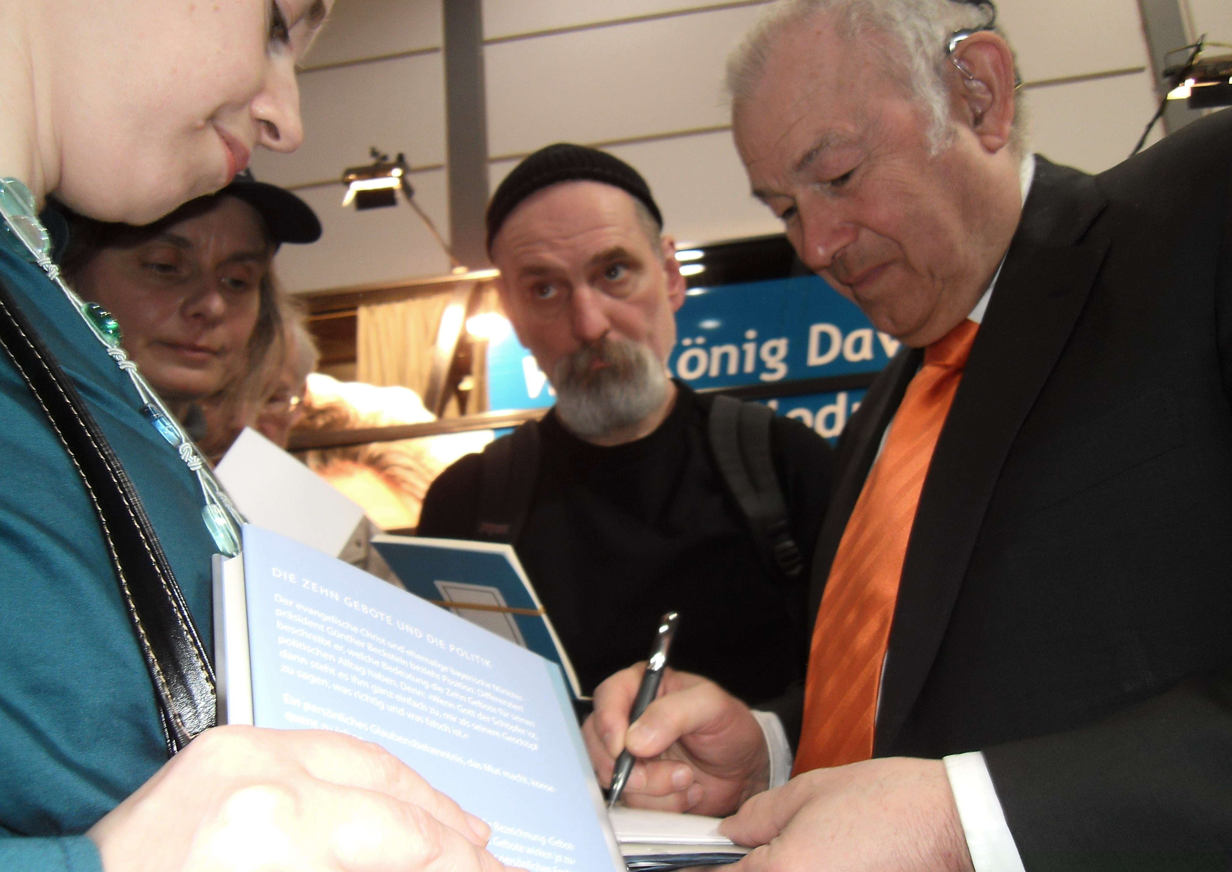 Günther Beckstein (* 1943) signiert sein Buch Die Zehn Gebote auf der Leipziger Buchmesse im März 2011